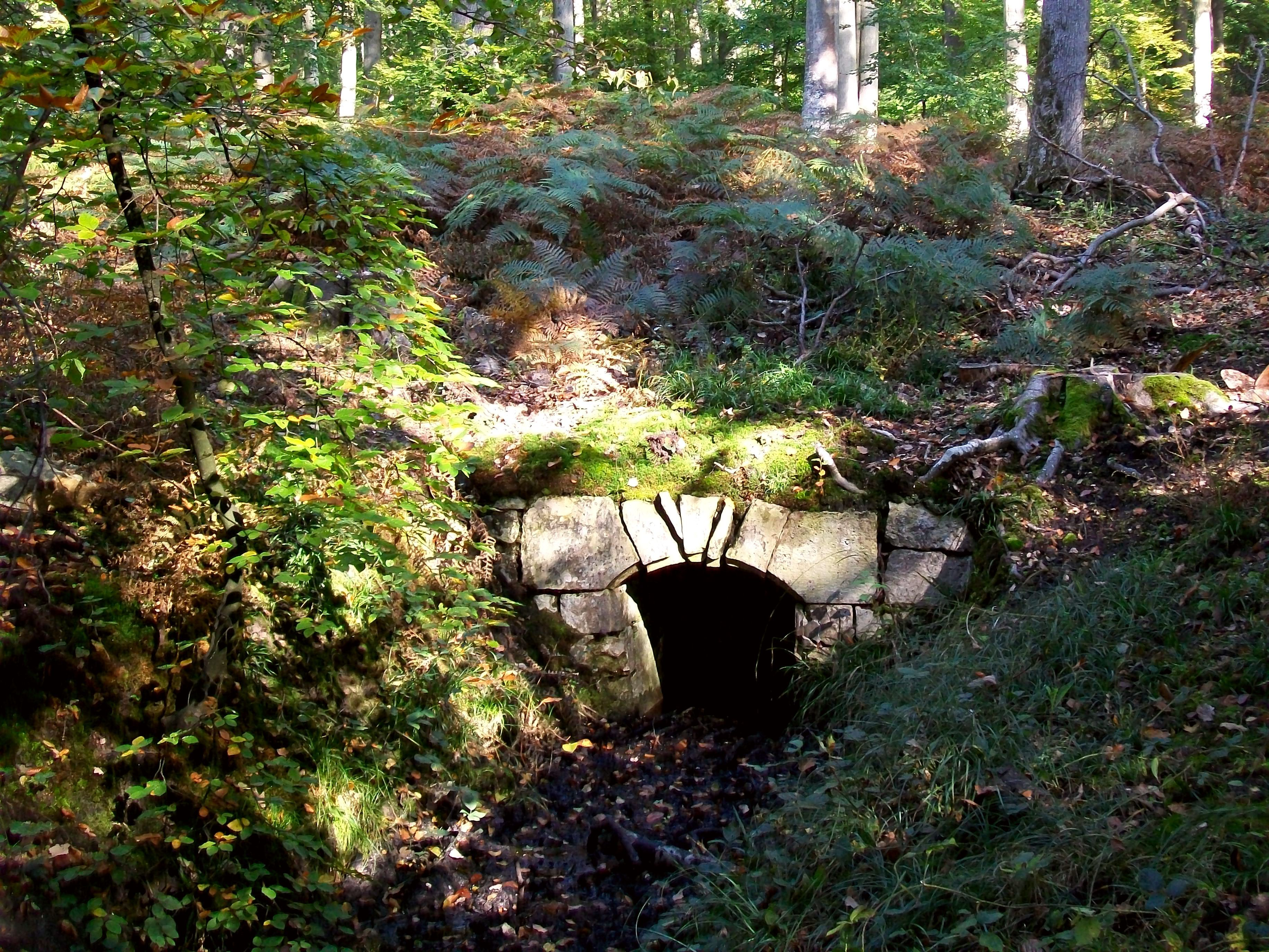 Fontaine à margelle en pierre caractéristique de la forêt d'Halatte, datation incertaine (XVIe - XVIIe s.), destinée aux animaux sauvages ainsi qu'aux chevaux et chiens de meute lors des parties de chasse à courre